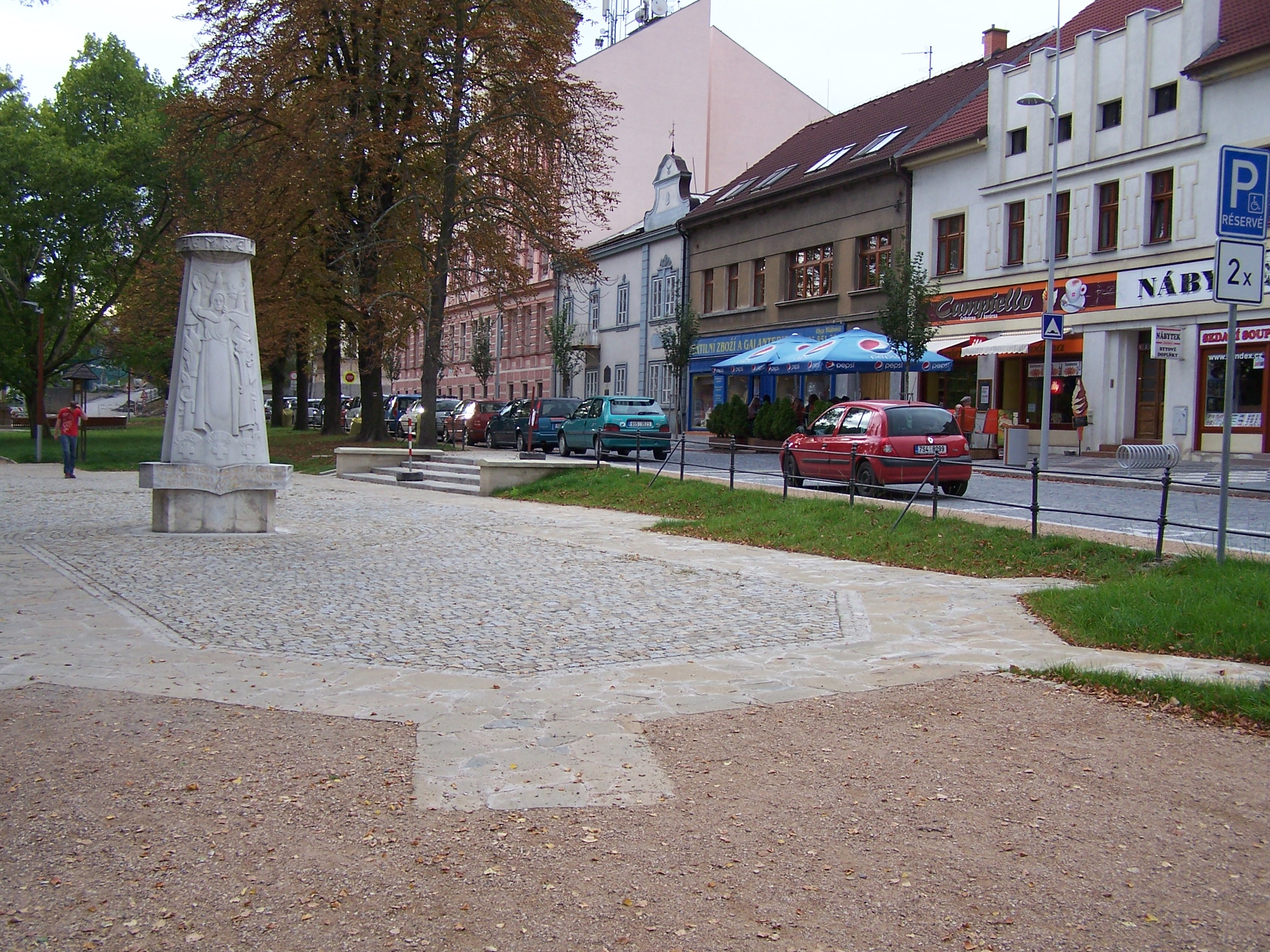 Lysá nad Labem, obrys starého farního kostela na náměstí, současný stav.